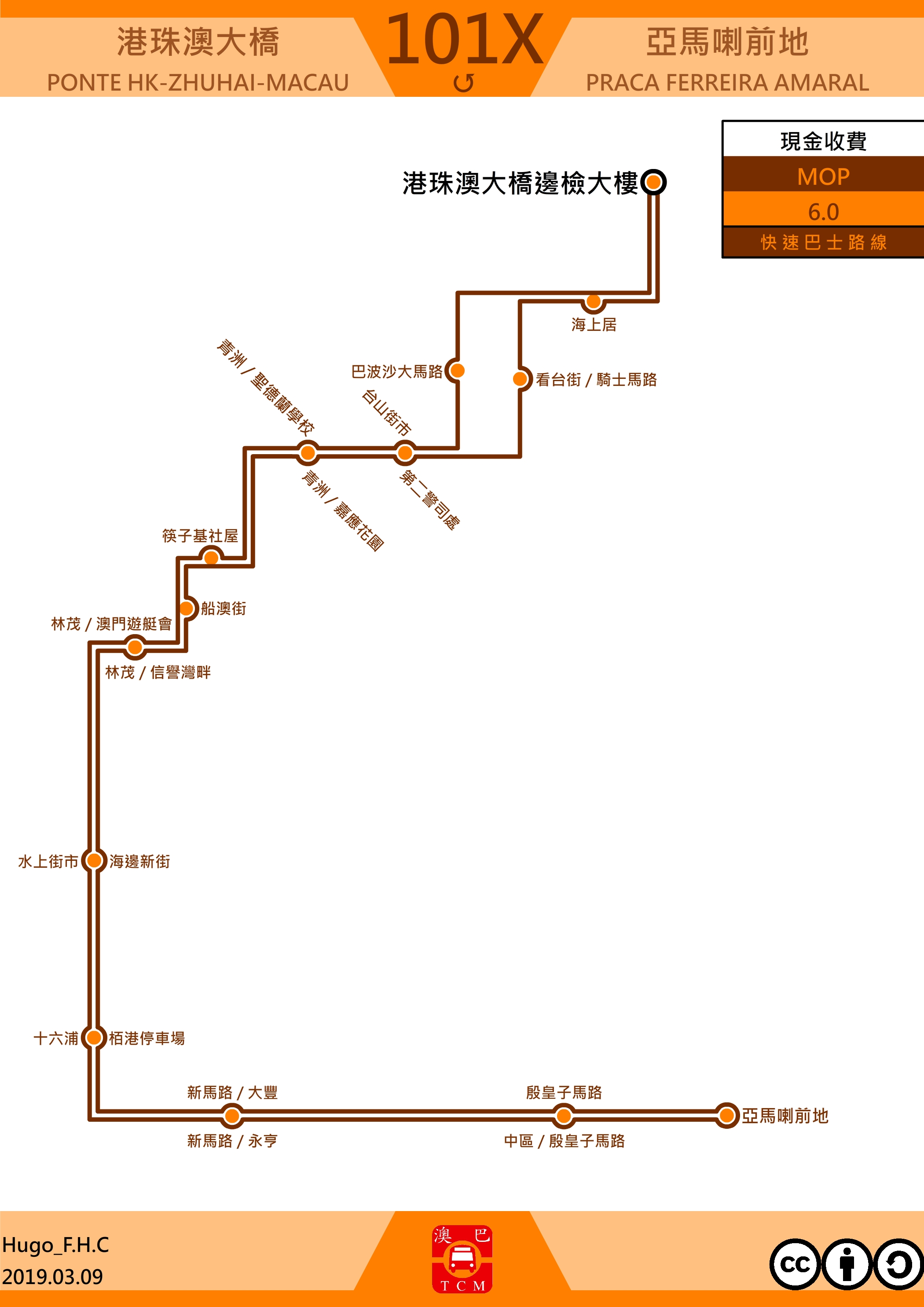 澳門巴士101X走線圖